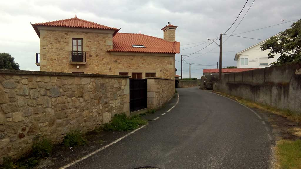 Vista da Pedreira, Covas.